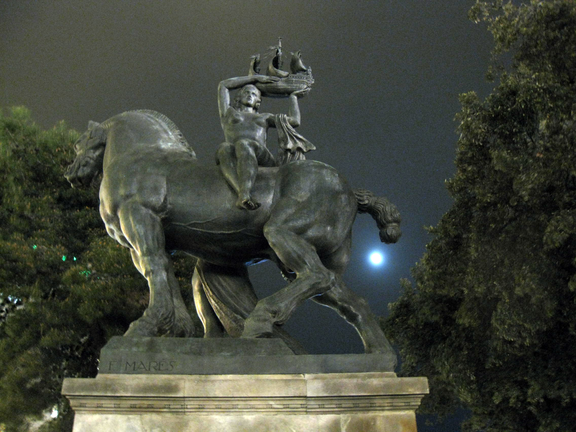 Barcelona (Frederic Marès). Pl. Catalunya (Barcelona)